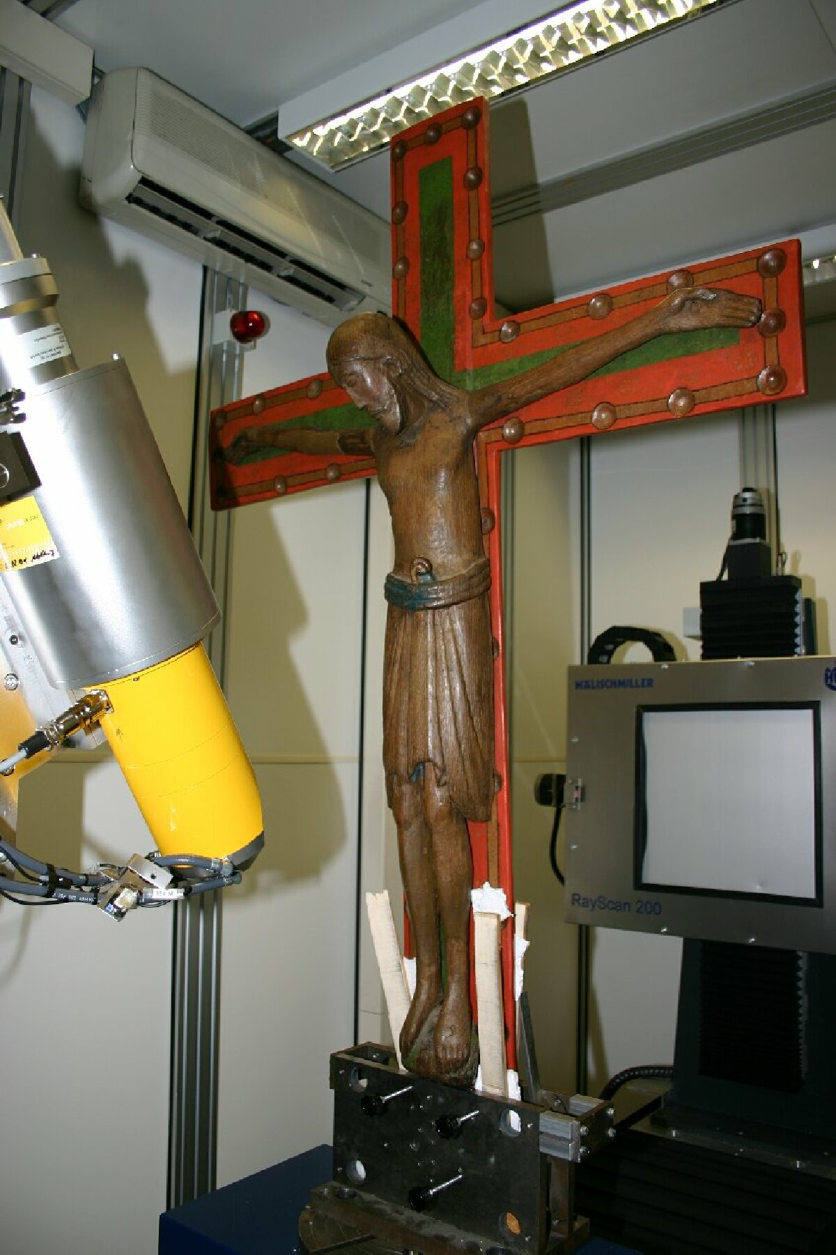 Untersuchung des Kreuzes an der FH-Aalen